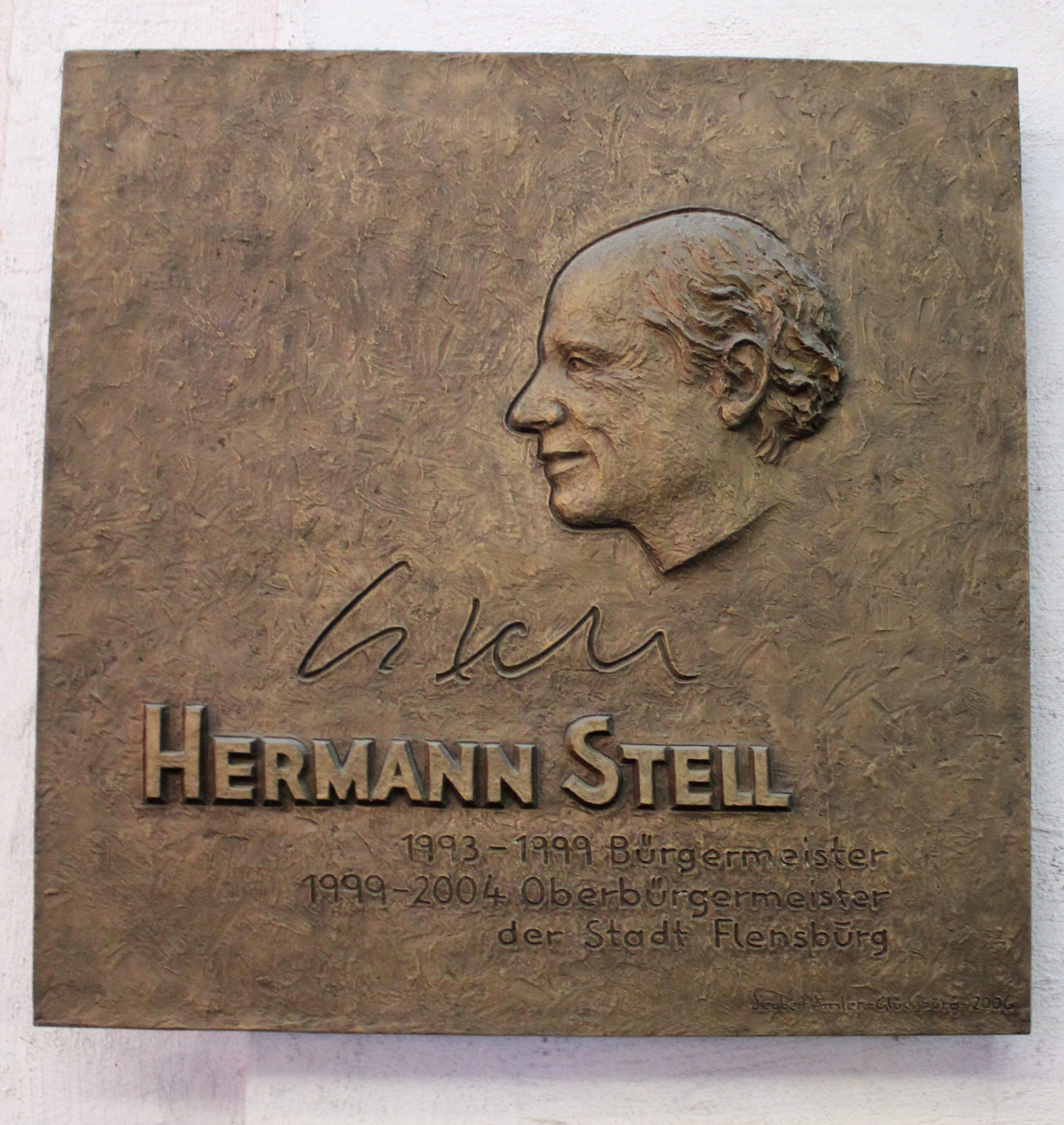 Flensburg Galerie, Die Gedenktafel an Hermann Stell, zu finden beim Kulturdenkmal Kaufmannshof Rückflügel, Holm 59 (Flensburg)